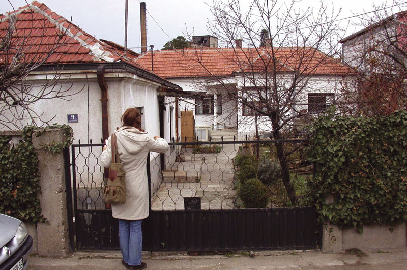 Породична кућа Бранка Миљковића у Нишу